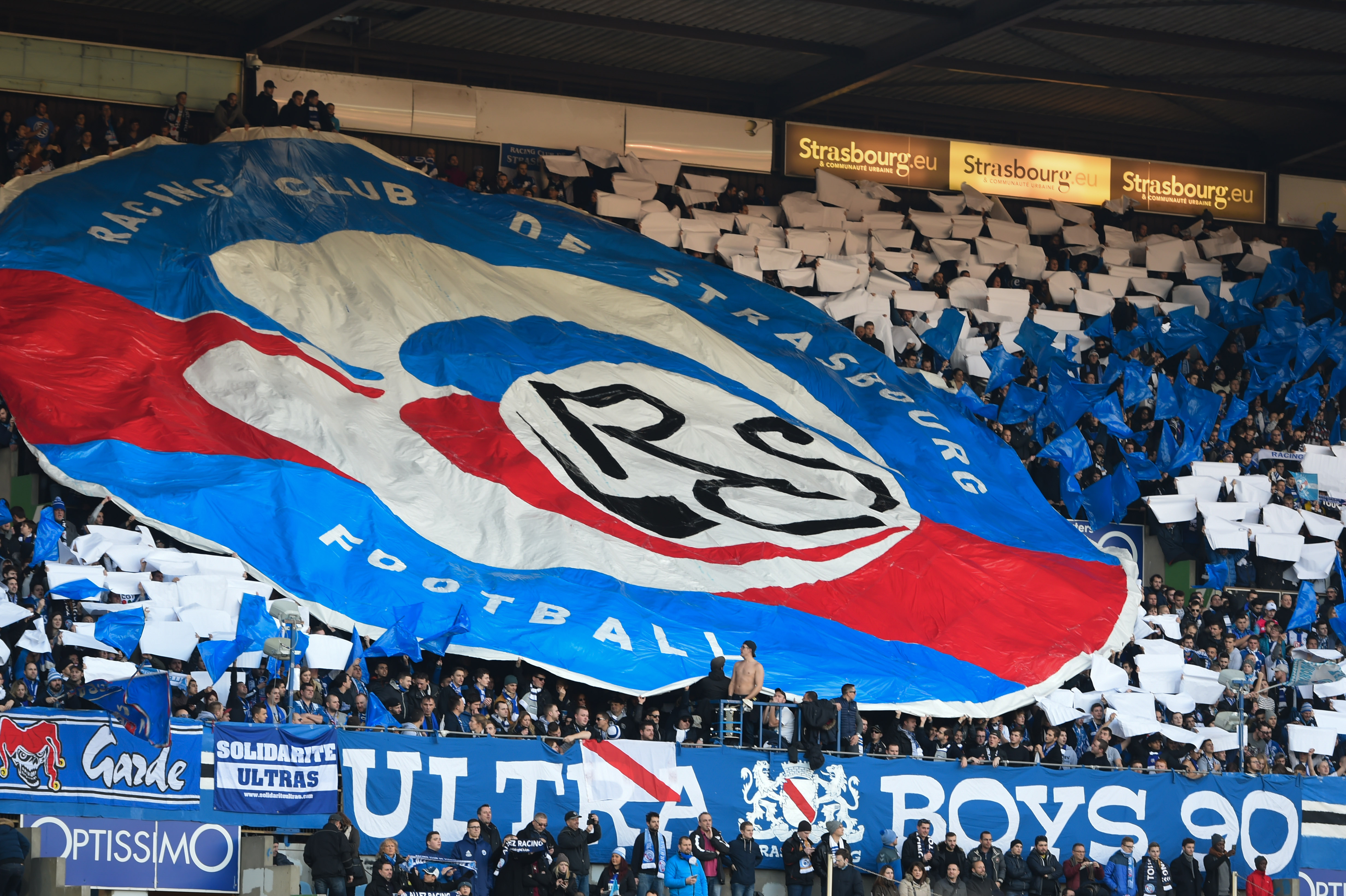 tifo et kop RCSA Racing Club de Strasbourg Alsace au stade de la Meinau. photo Franck KOBI / Haguenau port 06.81.38.09.98